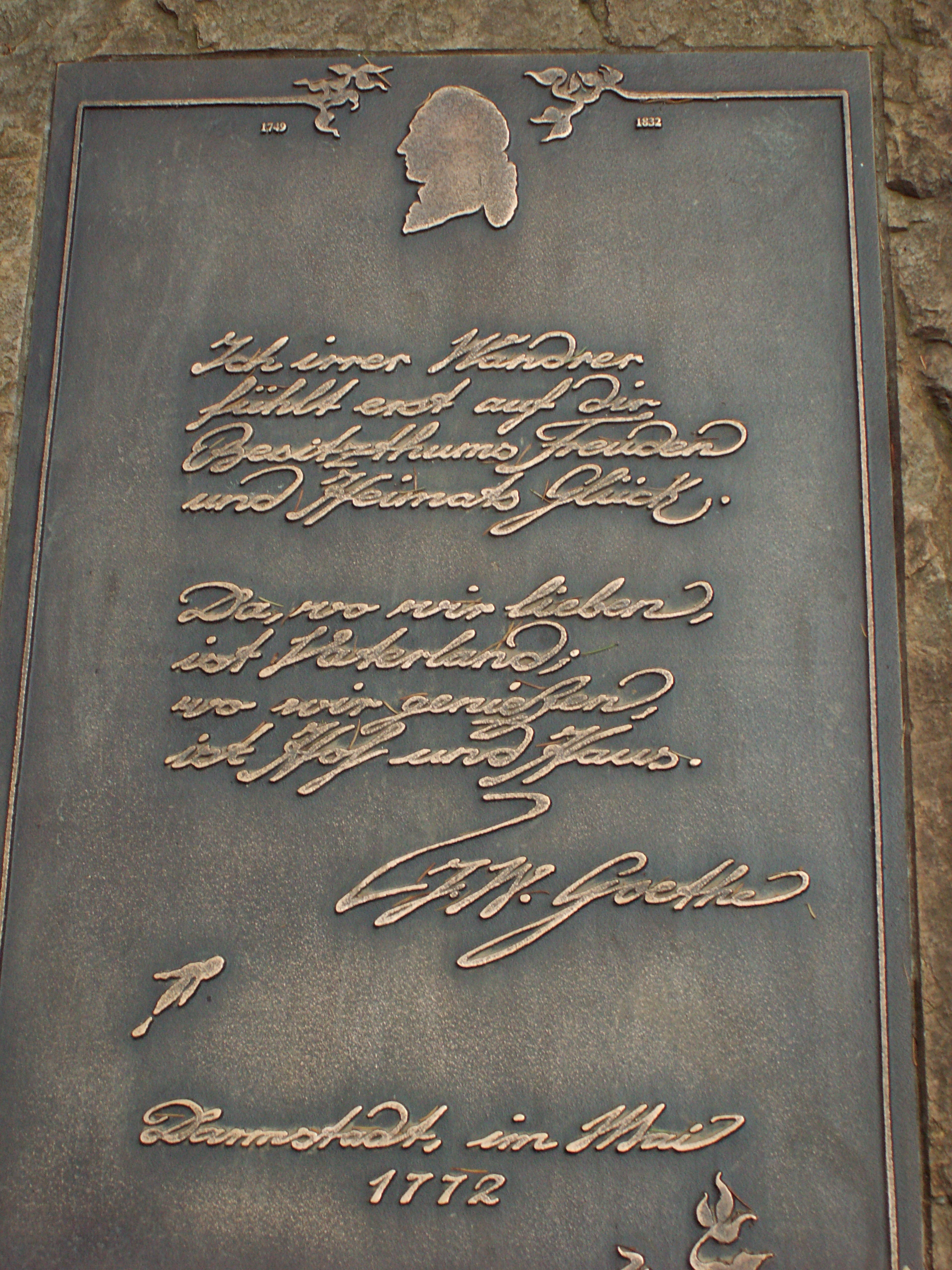 Augenommen auf der Ludwigshöhe südöstlich von Darmstadt. Hier finden alljährlich Waldkunstaktionen statt, deren Installationen zum Teil die Ausstellungen überdauern. Näheres zu einem Spaziergang, der zu den Kunstwerken führt, findet sich auf der Seite froutes Spaziergang auf der Ludwigshöhe.